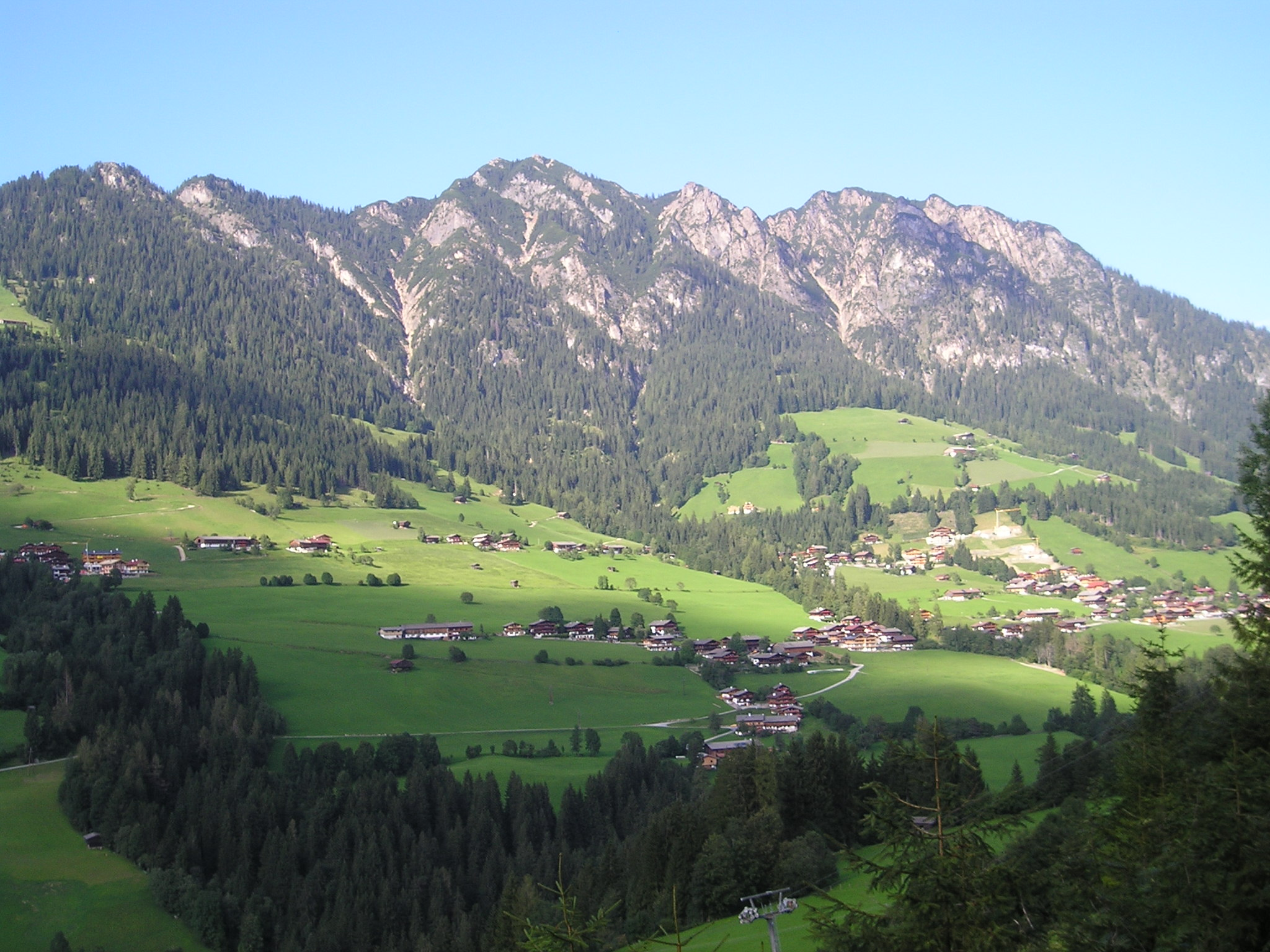 Alpbach und Gratlspitz (1899m), Blick vom Wiedersberger Horn